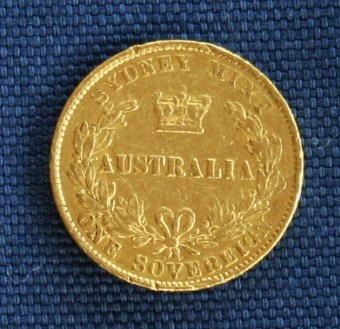 Victoria Australien 1867 Revers